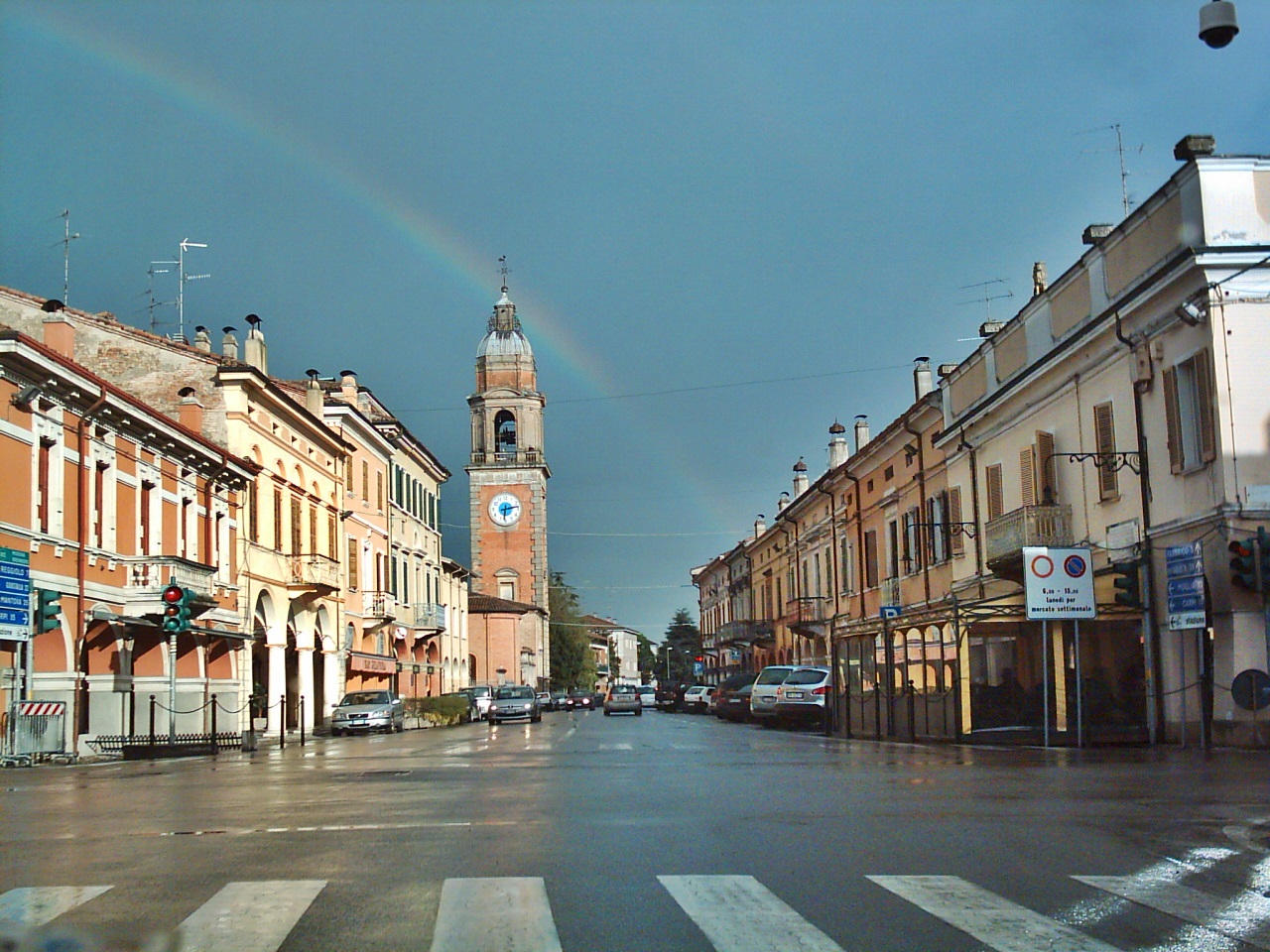 Palazzo Comunale This is a photo of a monument which is part of cultural heritage of Italy.